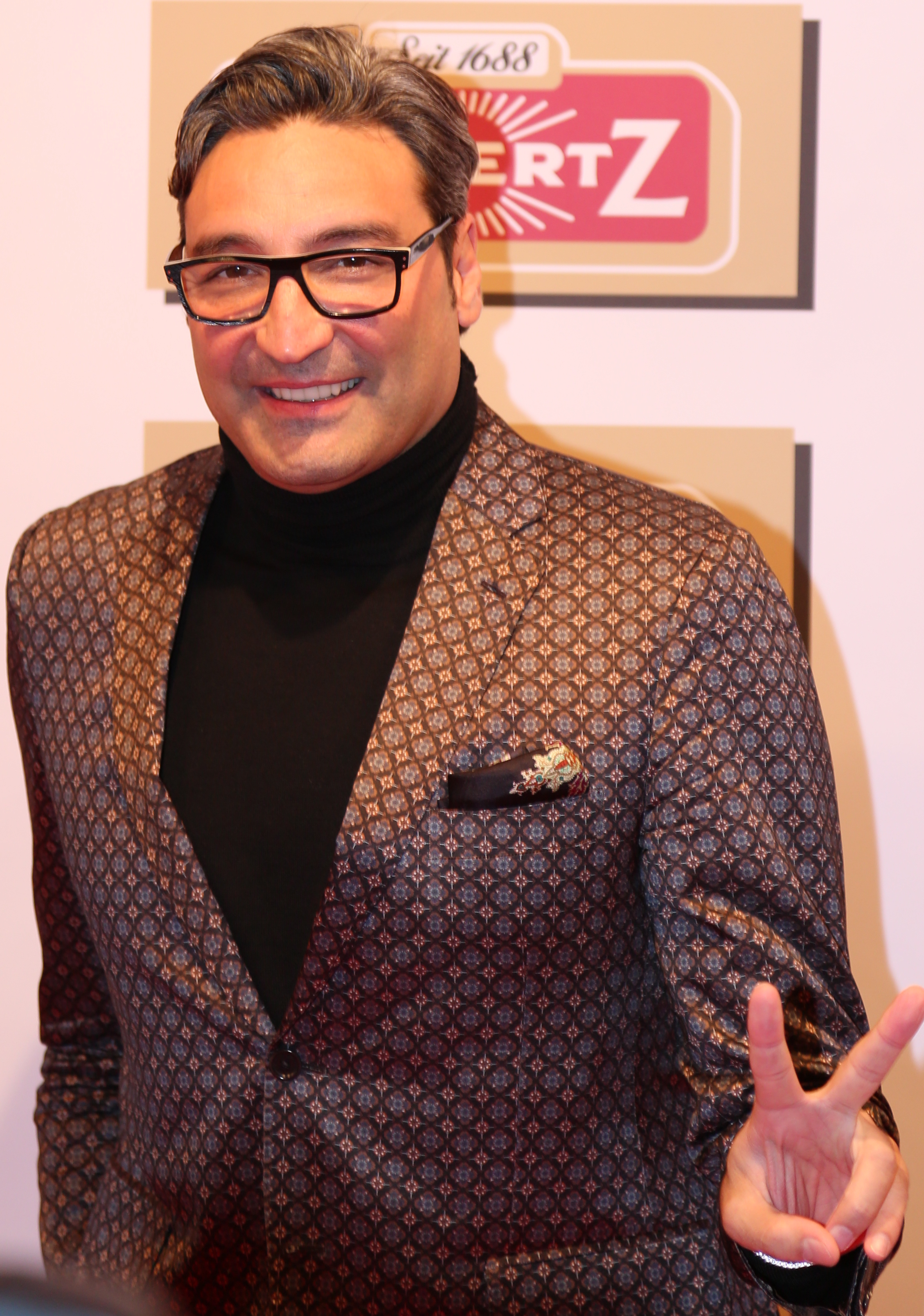 Mousse T. bei der Lambertz Monday Night 2017.